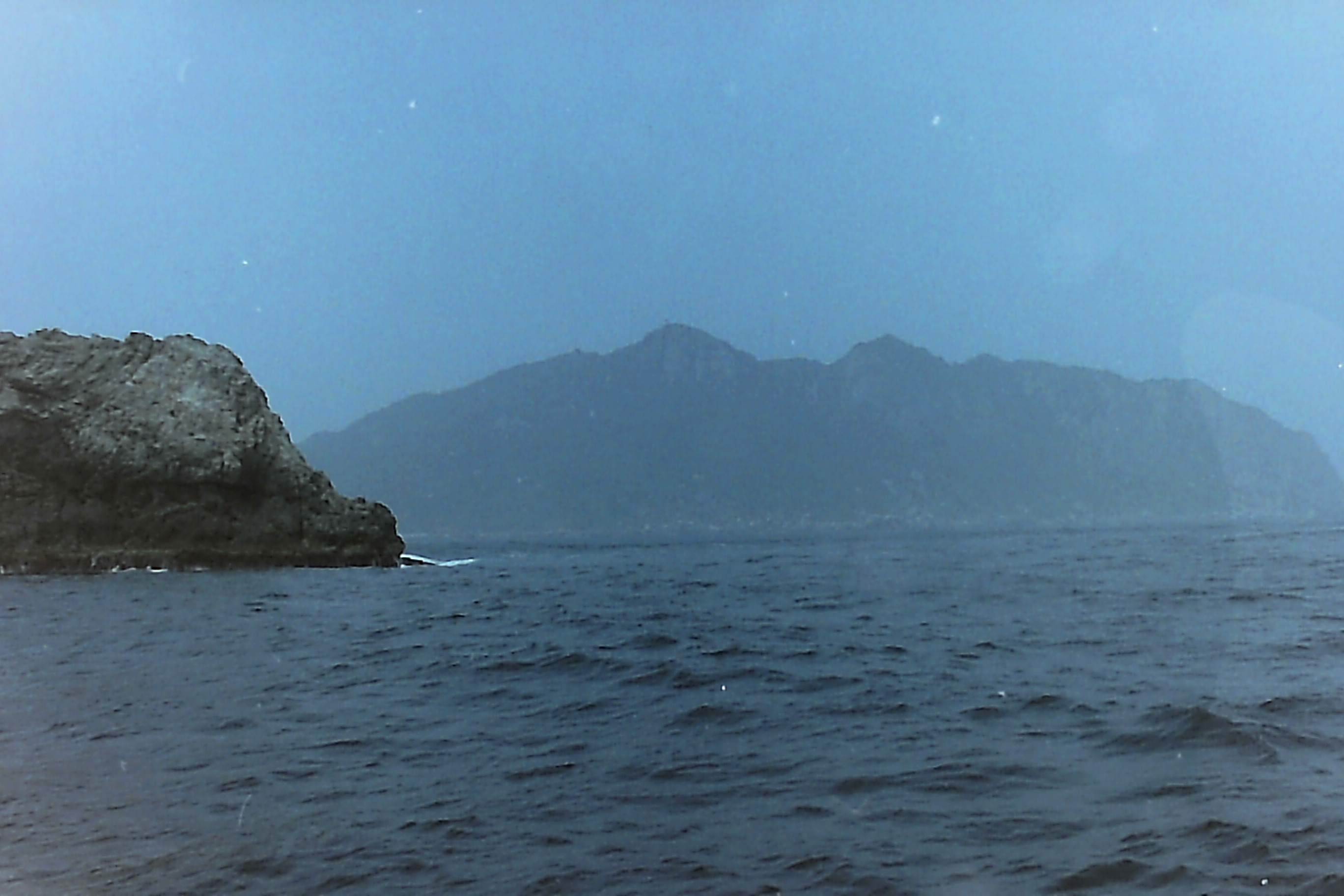 沖ノ島(奥)の鳥居の役割を果たしている小屋島(左) 2007年5月27日の渡島の際に撮影（フィルムスキャナーでネガをデジタル画像化）